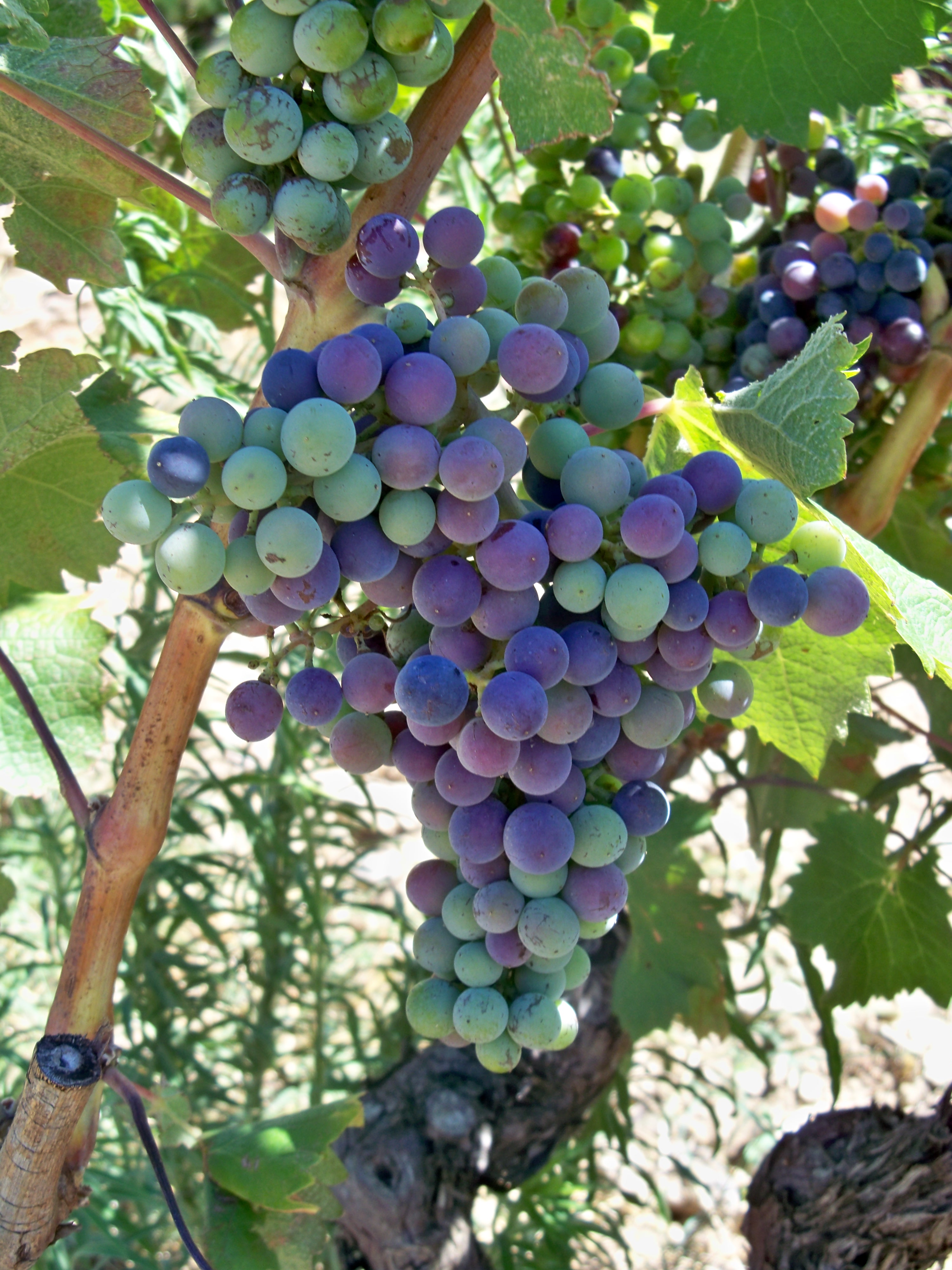 Véraison : état où le raisin commence sa maturation